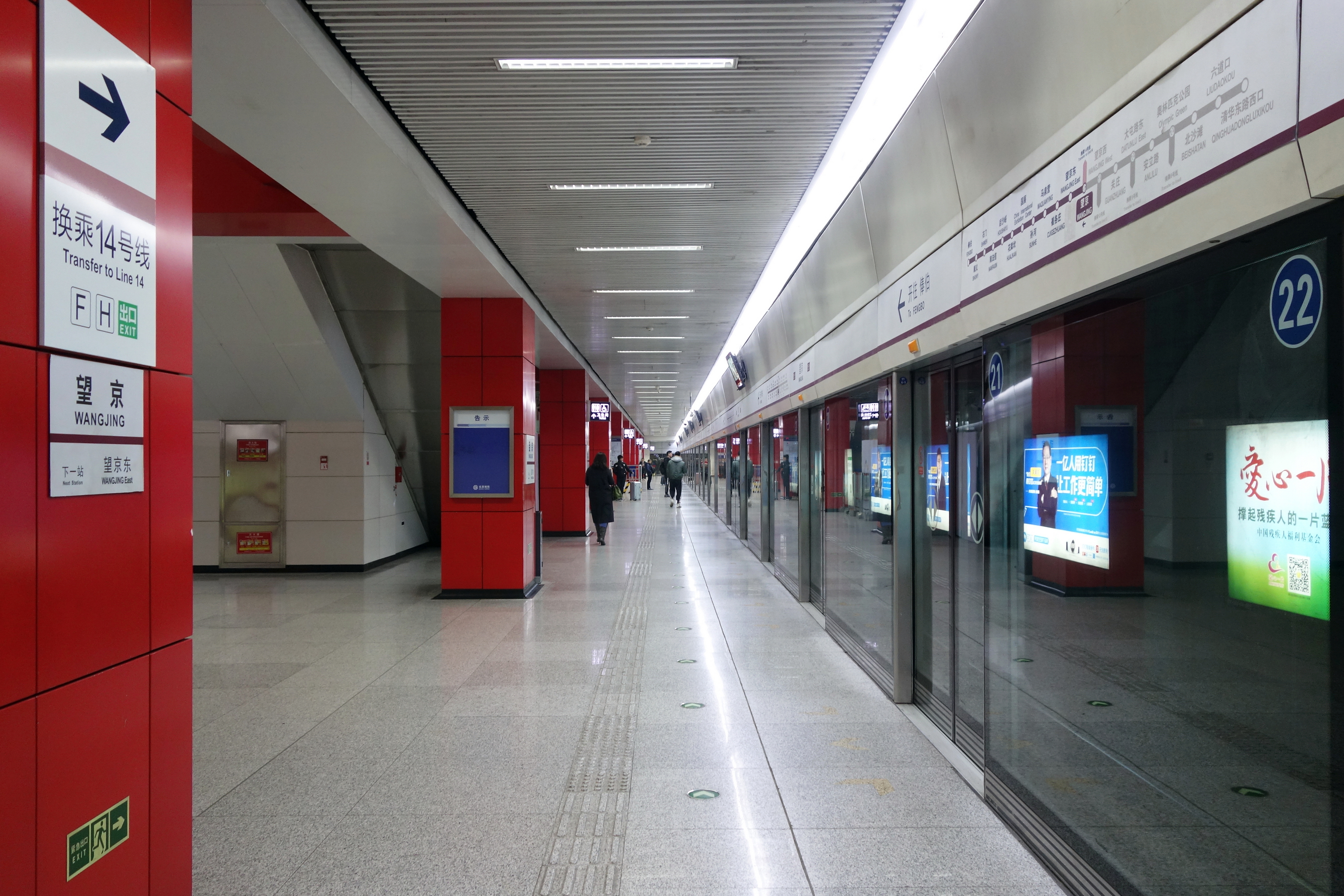 北京地铁15号线望京站站台